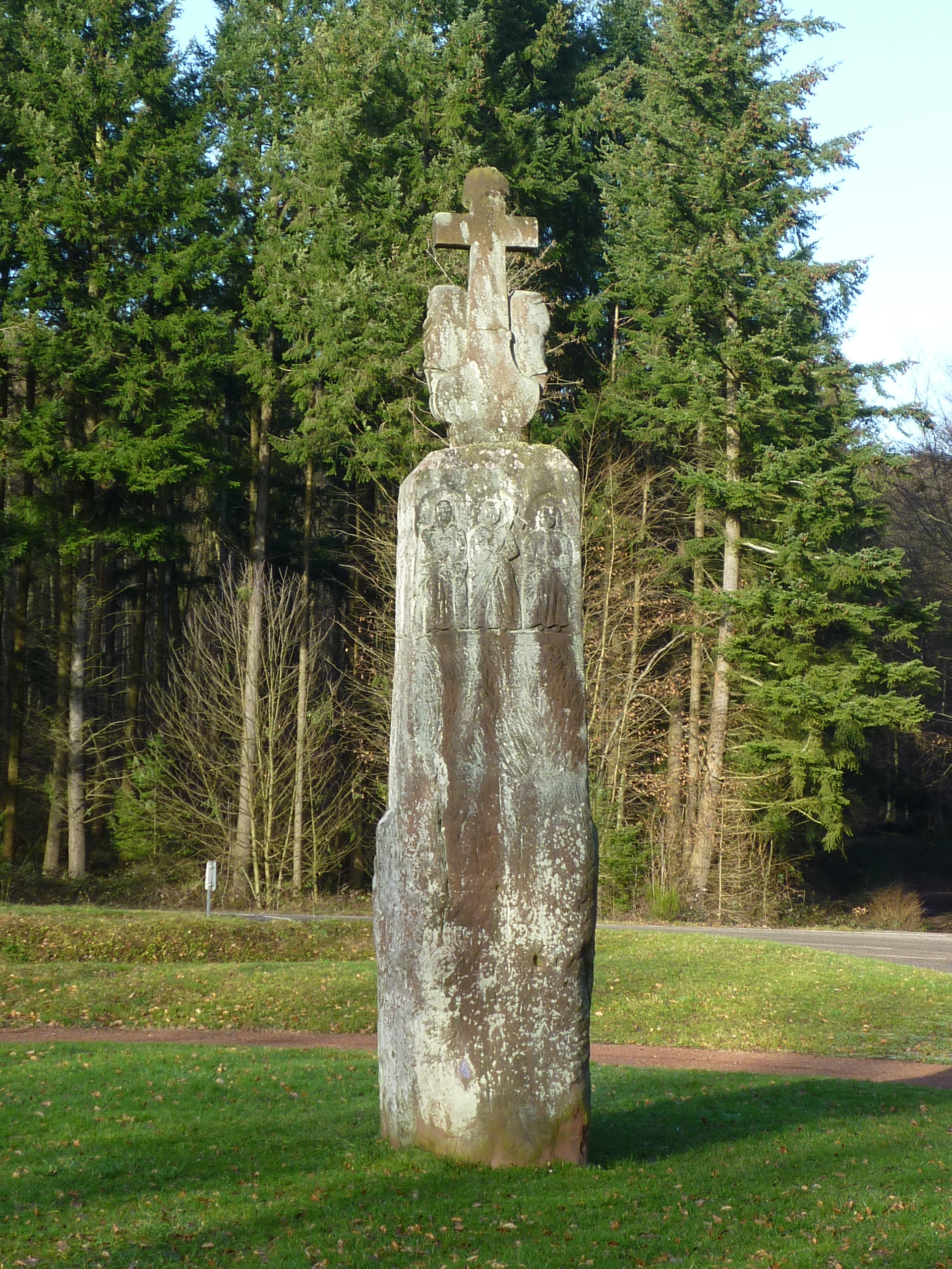 Pierre des 12 apôtres (Breitenstein) à Meisenthal